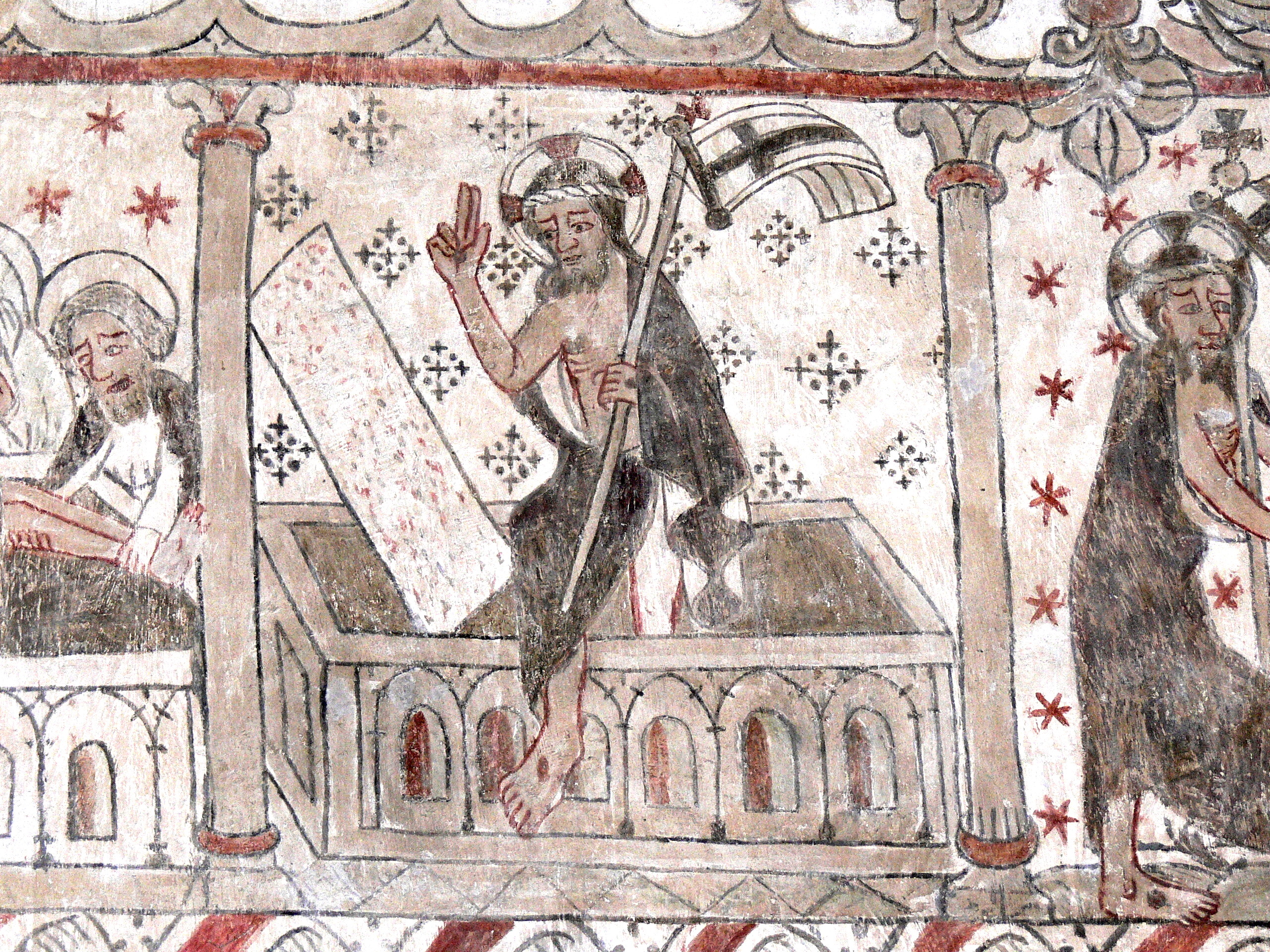 Öja Kyrka auf Gotland. Passionszyklus: Auferstehung